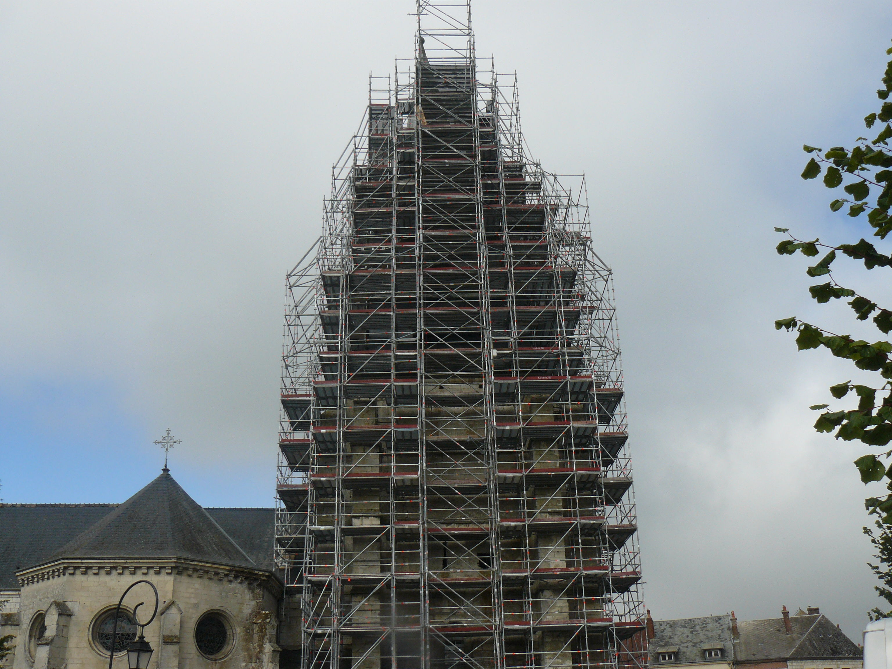 Le clocher de l'église Notre-Dame d'Aubenton est recouvert d'un immense échafaudage, permettant de le redresser.